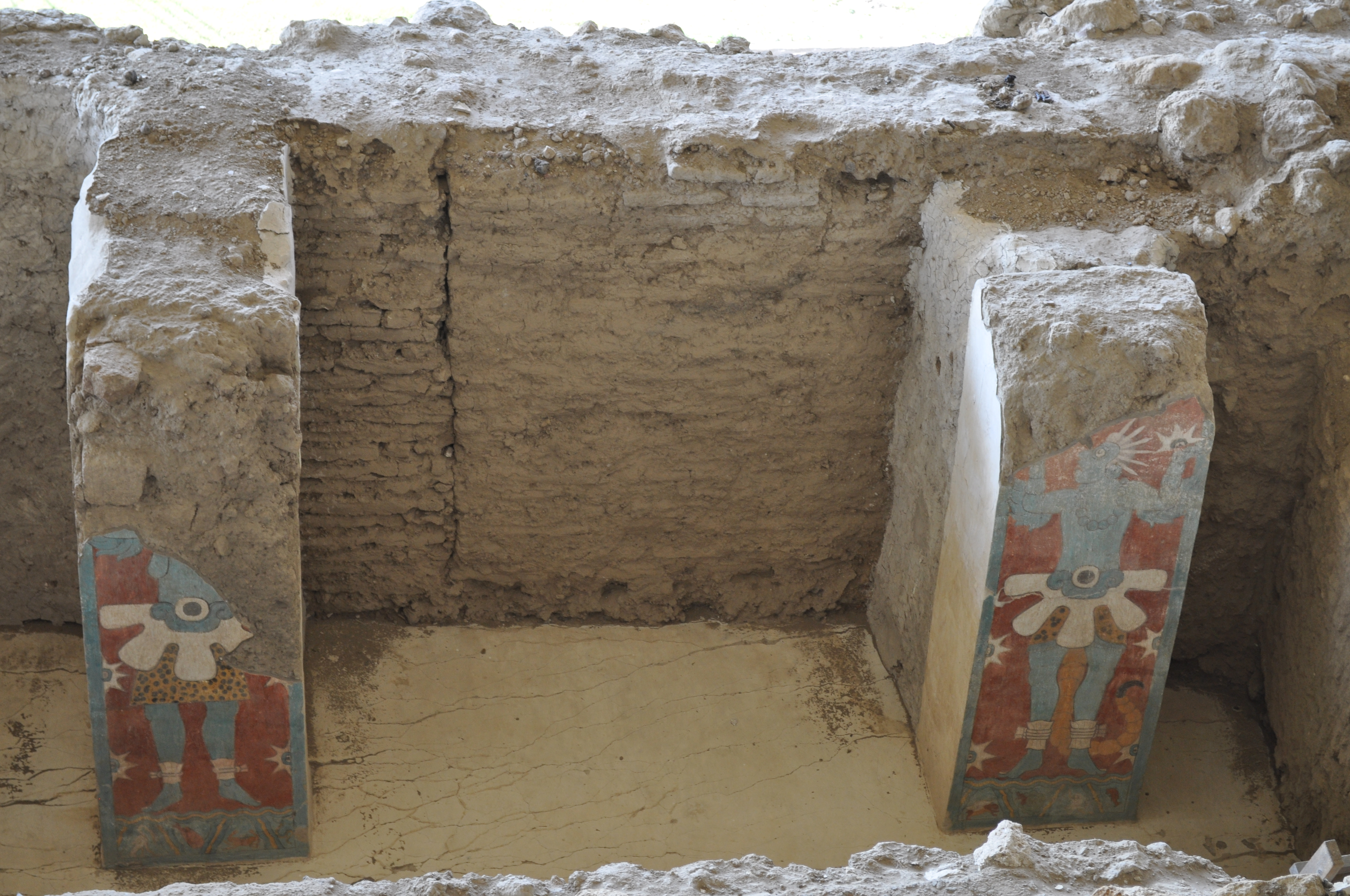 Cacaxtla